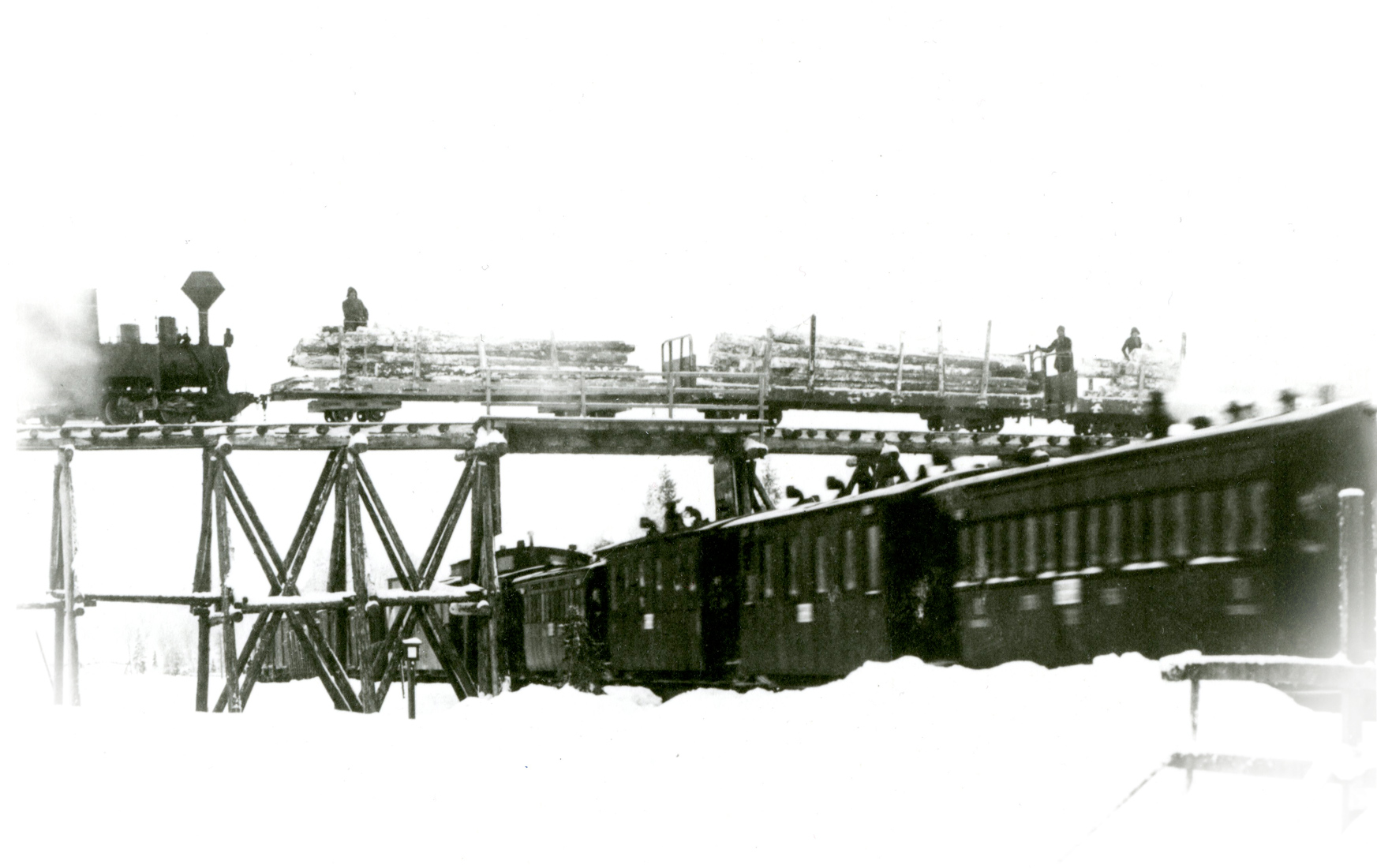 Ваахерйоки, 1920-е